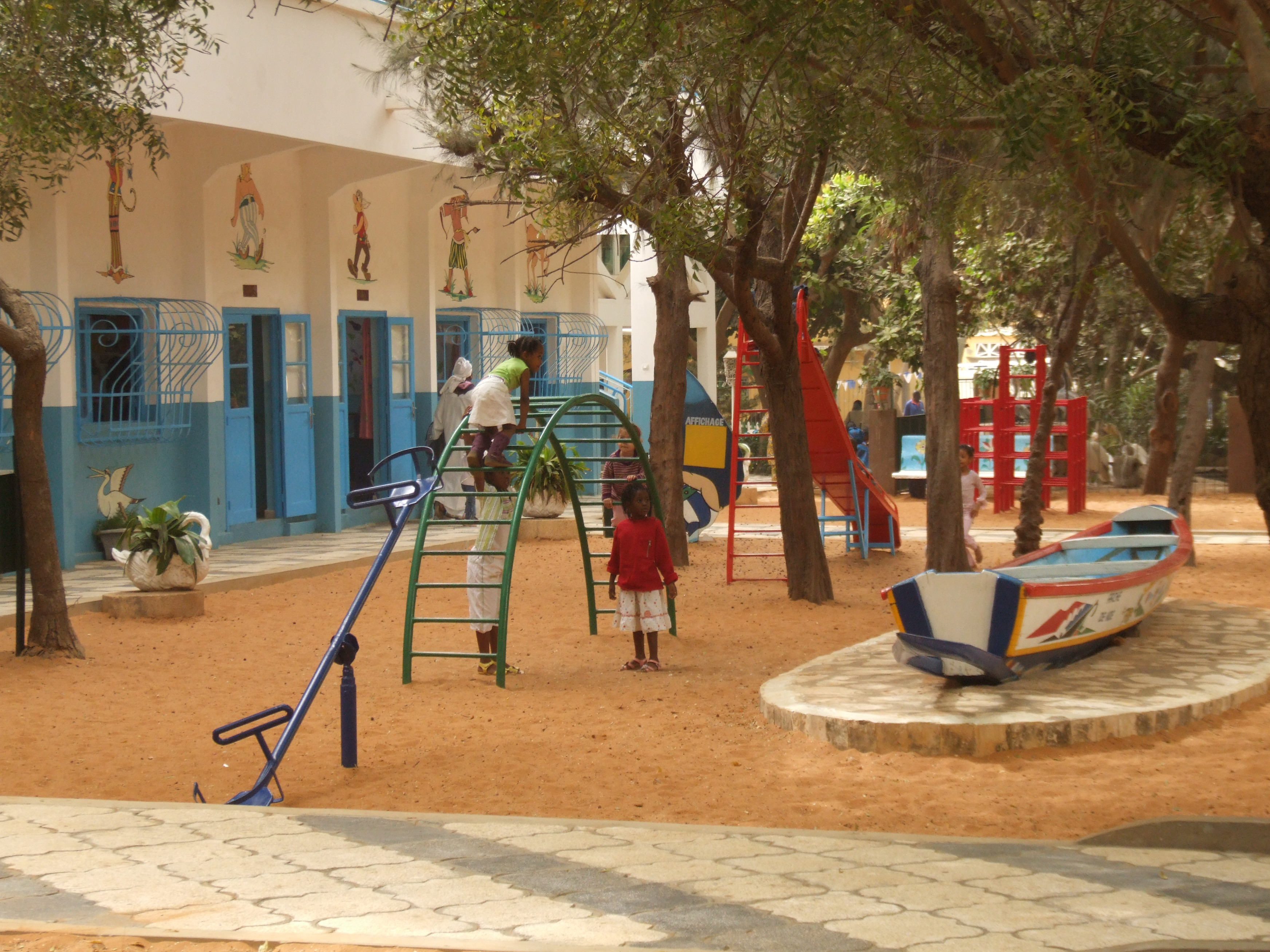 Aire de jeux du jardin d'enfants au Cours Sainte Marie de Hann (Dakar, Sénégal)